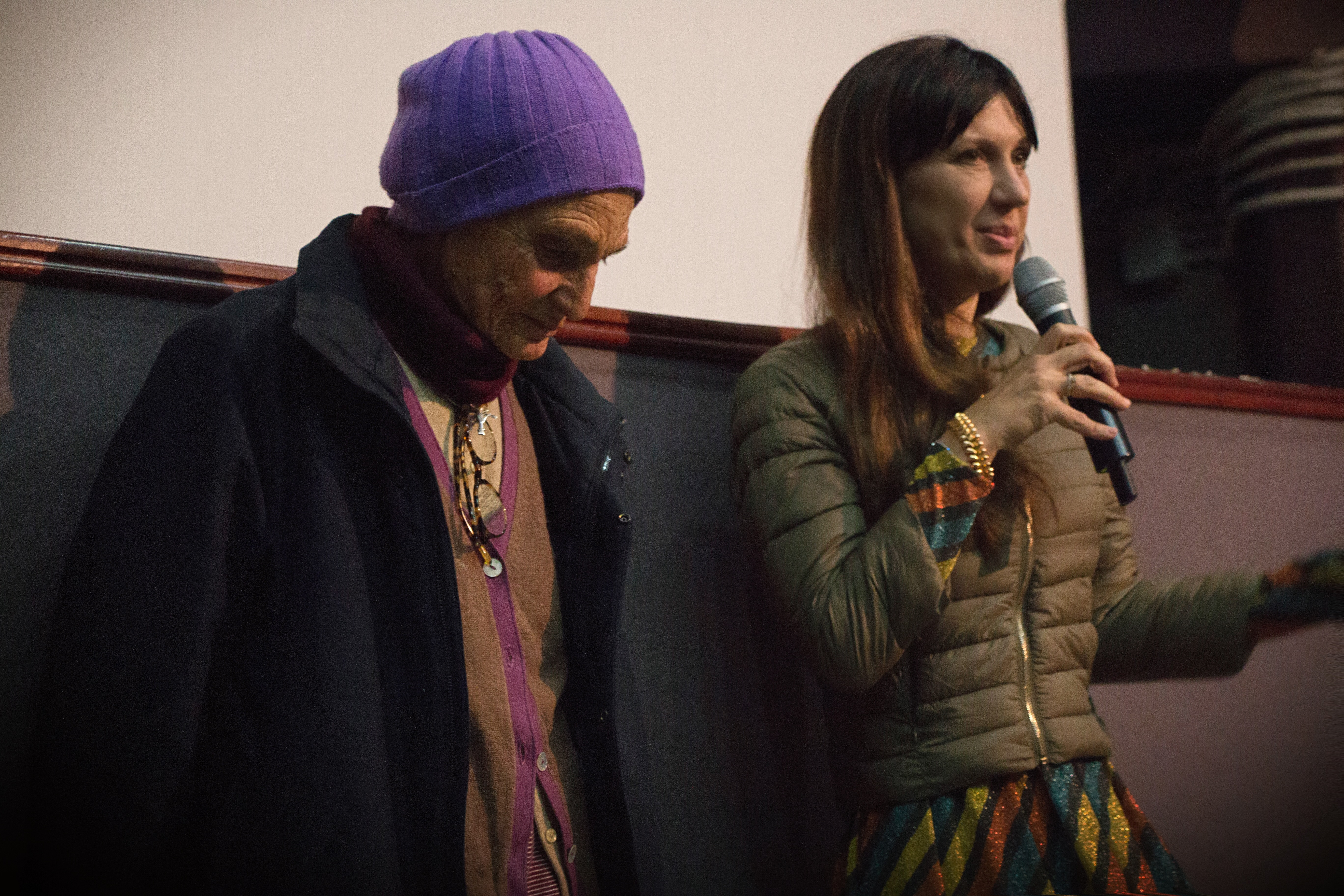 Cristina Sivieri Tagliabue e Benedetta Barzini alla presentazione del film "the disappearance of my mother" di Beniamino Barrese, figlio di Barzini, organizzata da Arci Movie di Napoli.